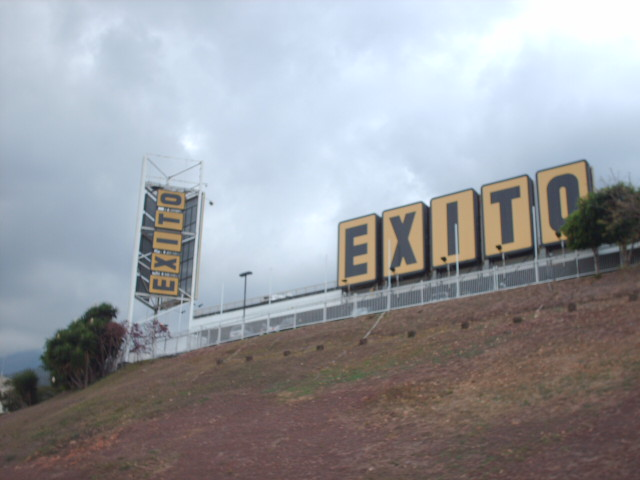 Entrada Éxito-Caracas